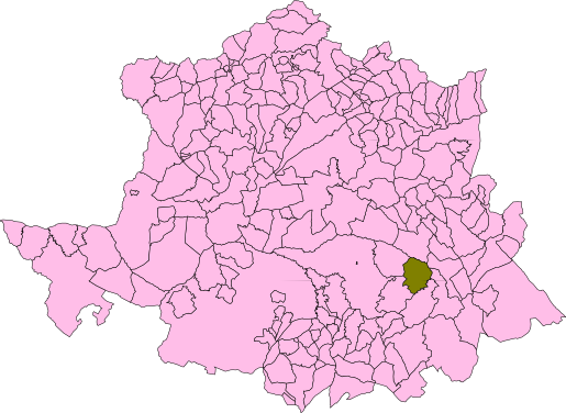 Aldeacentenera